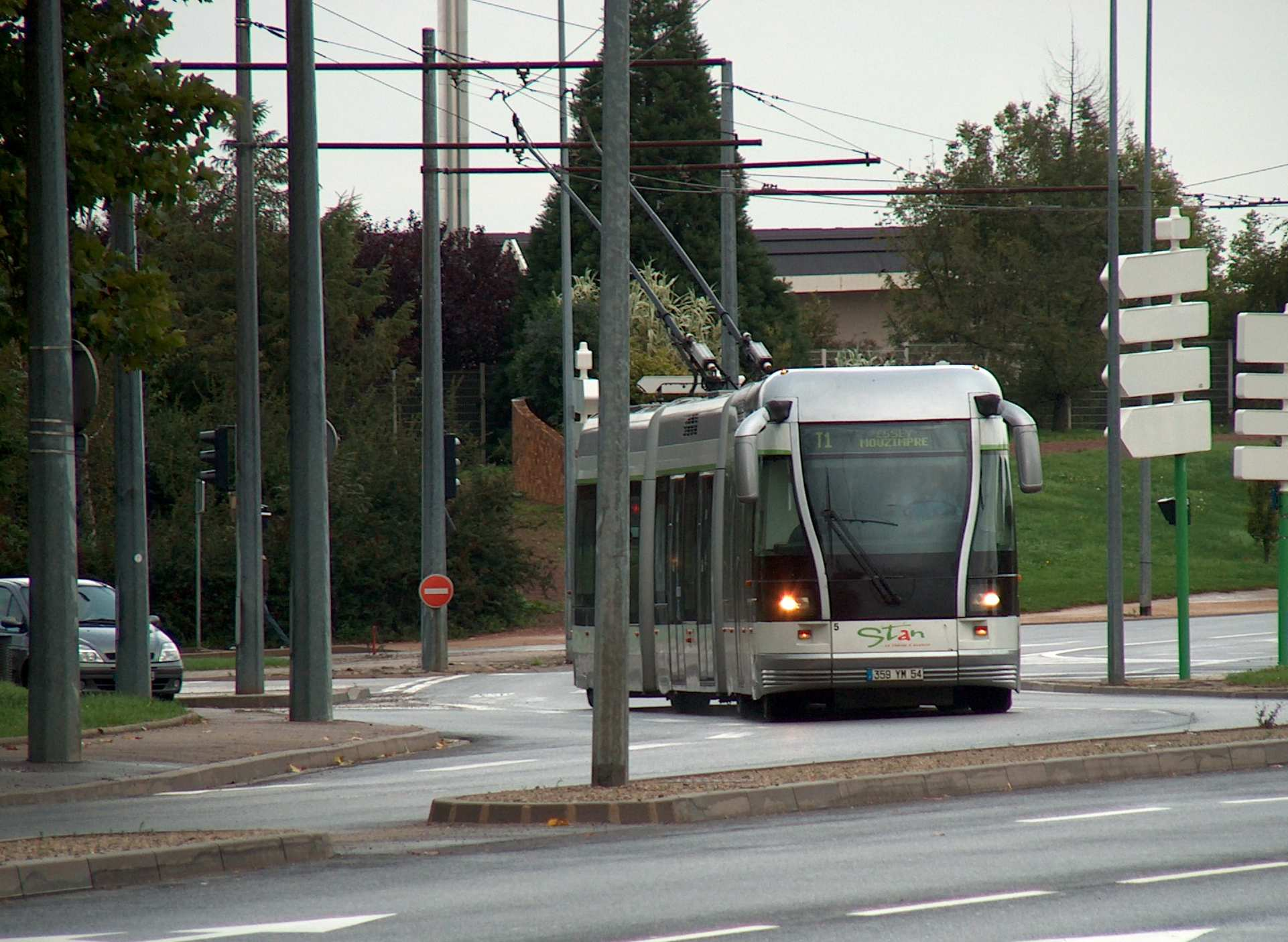 photo prise par mes soins, le 20 octobre 2006 à 15:15 On voit un véhicule du tram T1 arriver au milieu de la circulation, au terminus de Brabois. Il n'y a pas de rail de guidage, et le conducteur le conduit comme un trolleybus, avec un volant Muselaar 22 octobre 2006 à 23:27 (CEST)